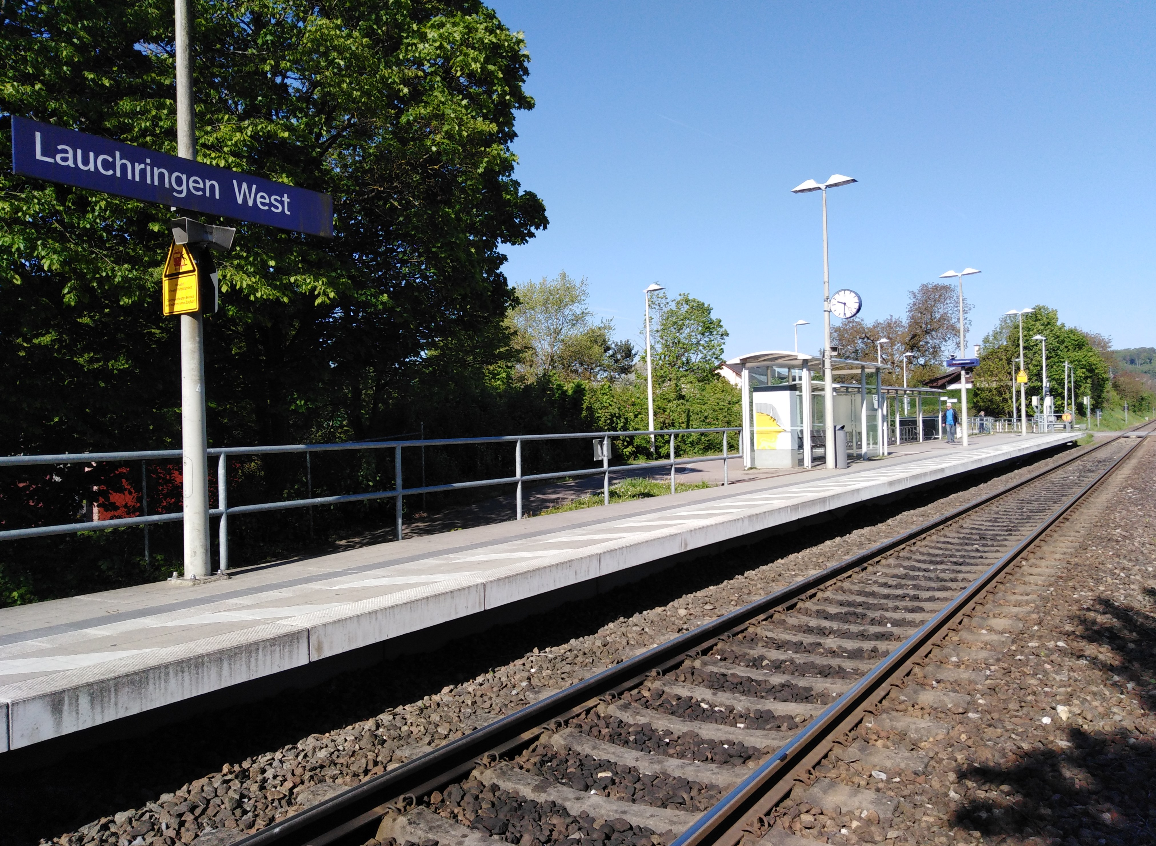 Lauchringen, Gemeinde im Landkreis Waldshut in Baden Württemberg. Bahnstation ‘Lauchringen West’ in Unterlauchringen.